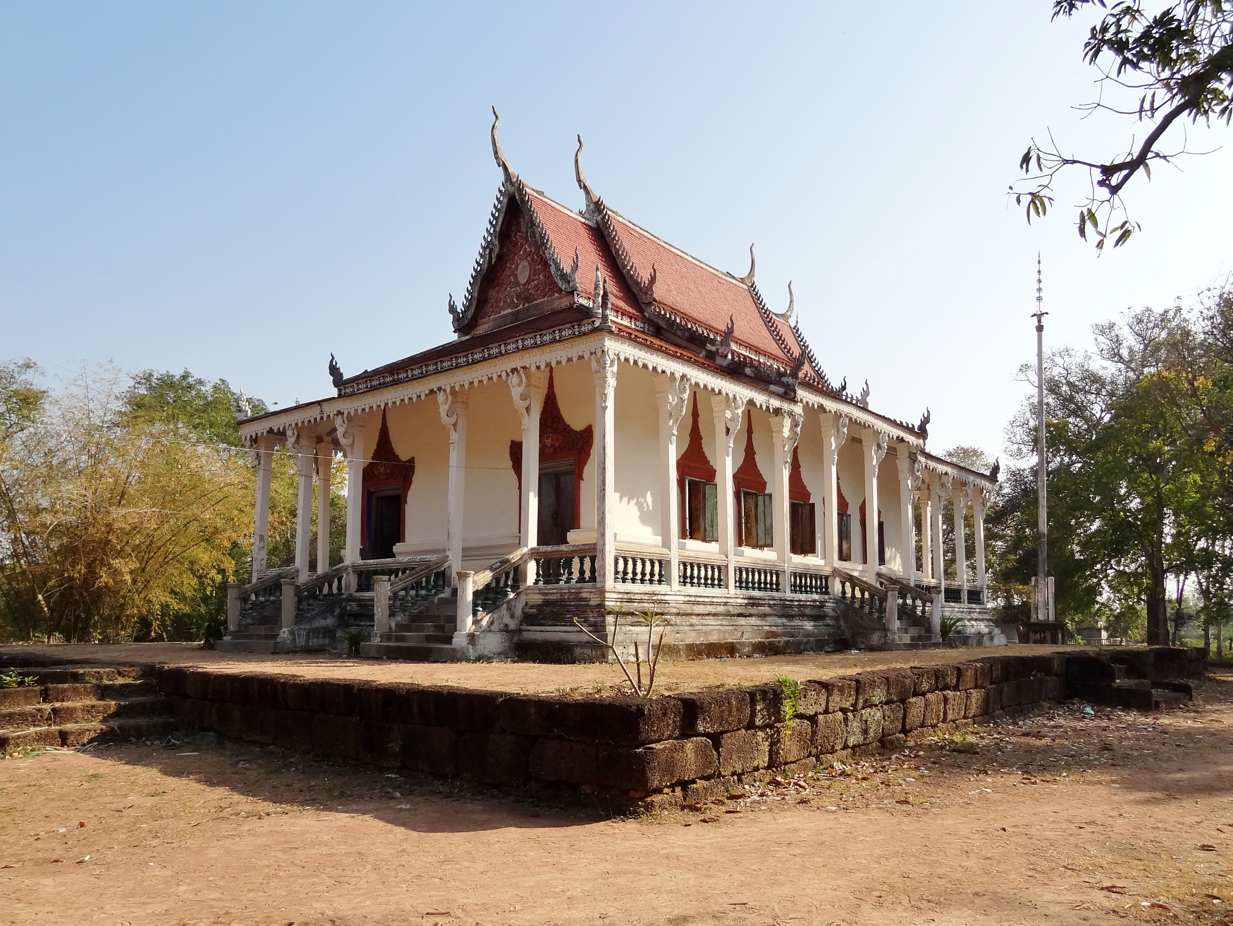 Vihara (Pagode) im Wat Kampong Tralach Loeu (វត្តកំពង់ត្រឡាចលើ) in der Provinz Kampong Chhnang, Kambodscha